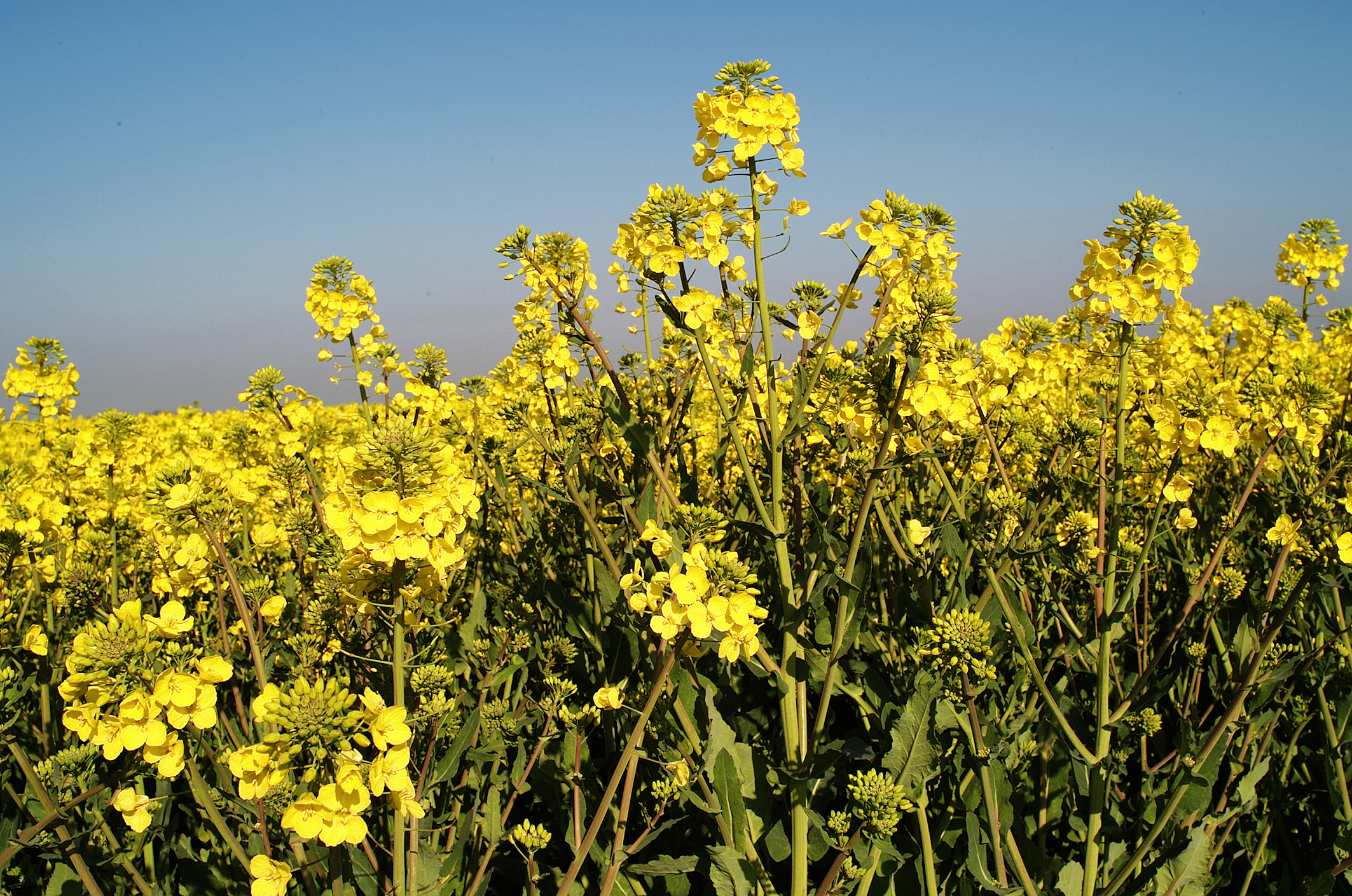 INRA, Jean Weber